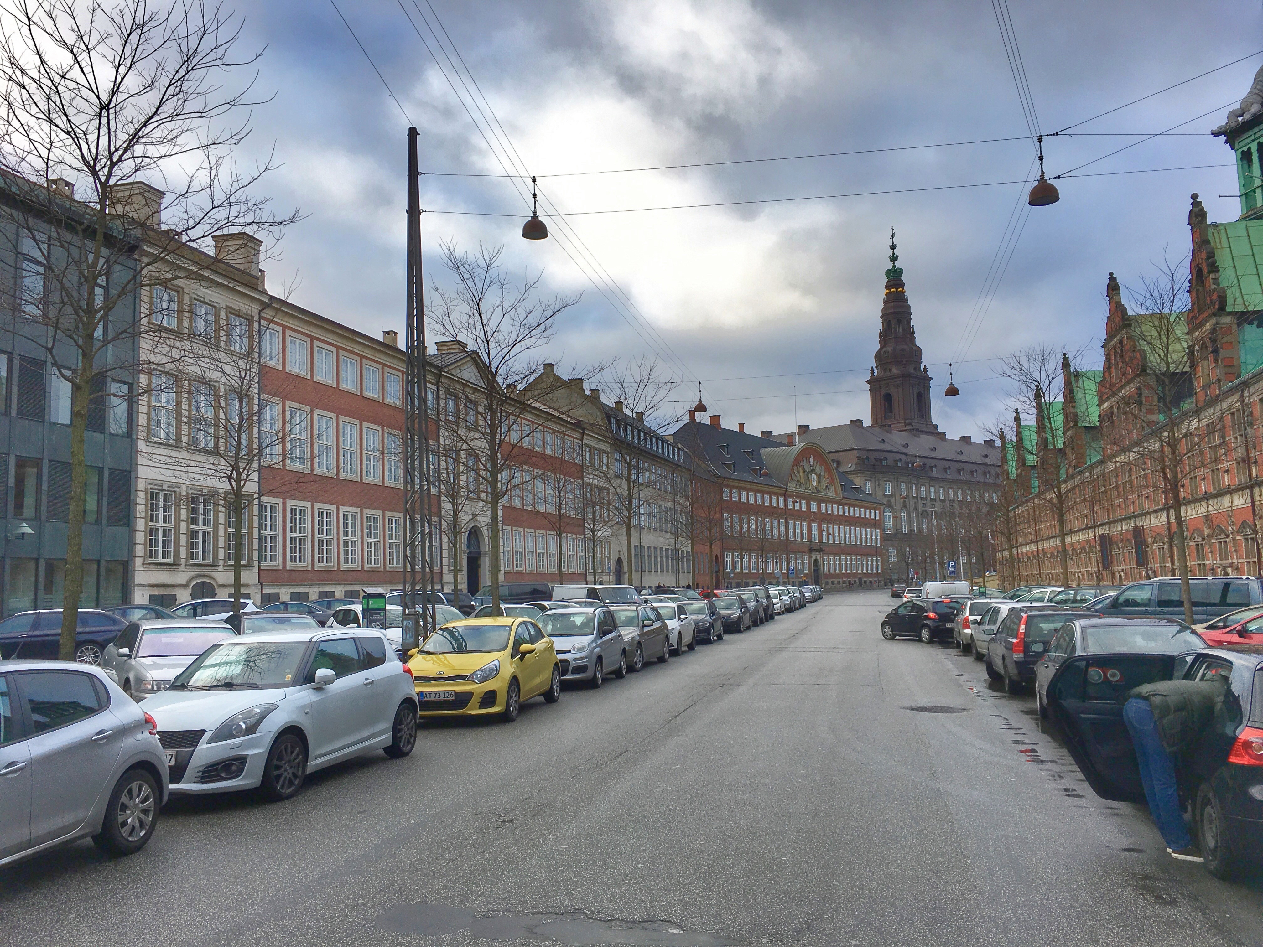 Slotsholmsgade, København